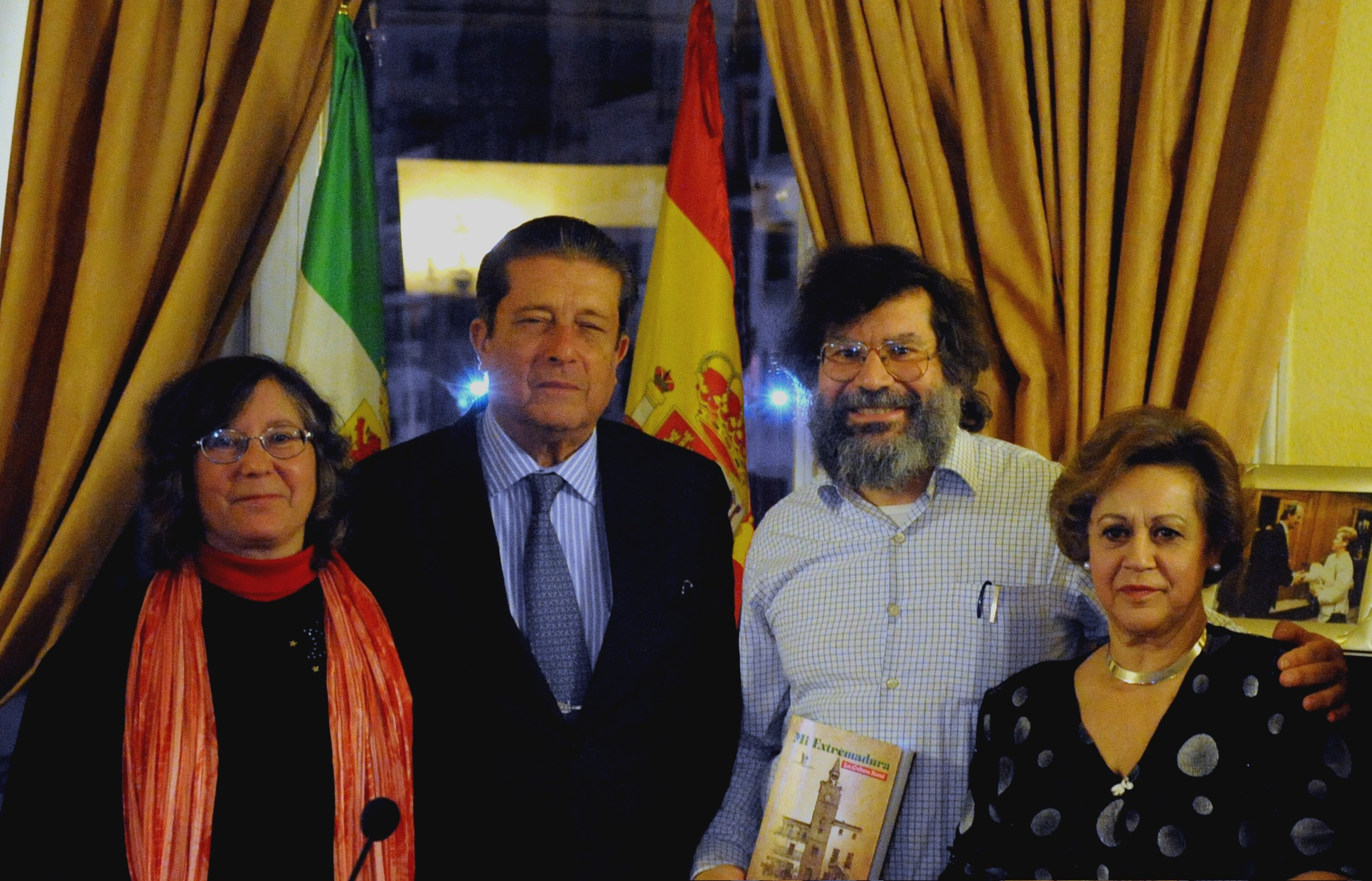 Federico Mayor Zaragoza en un acto cultural en el Hogar Extremeño de Madrid con Elisa y Miguel Herrero Uceda y Maruja Sánchez, presidenta del Hogar.